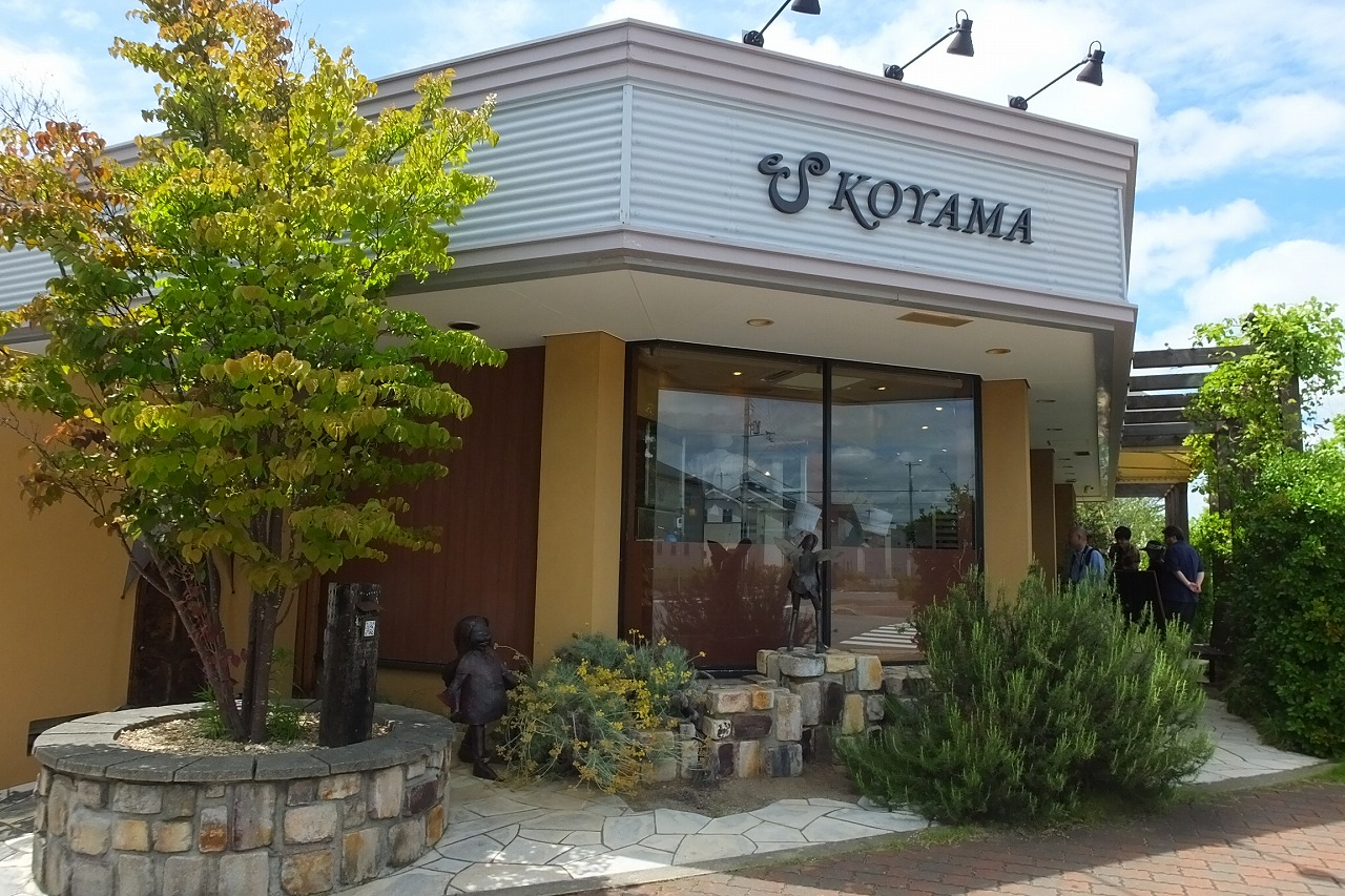 20190904 PATISSIER eS koyama パティシエ エス コヤマ 小山進